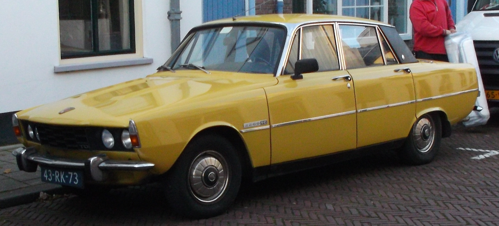 Rover 2200 TC, 9 december 2013